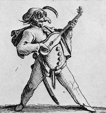 Zanni Character from the Commedia